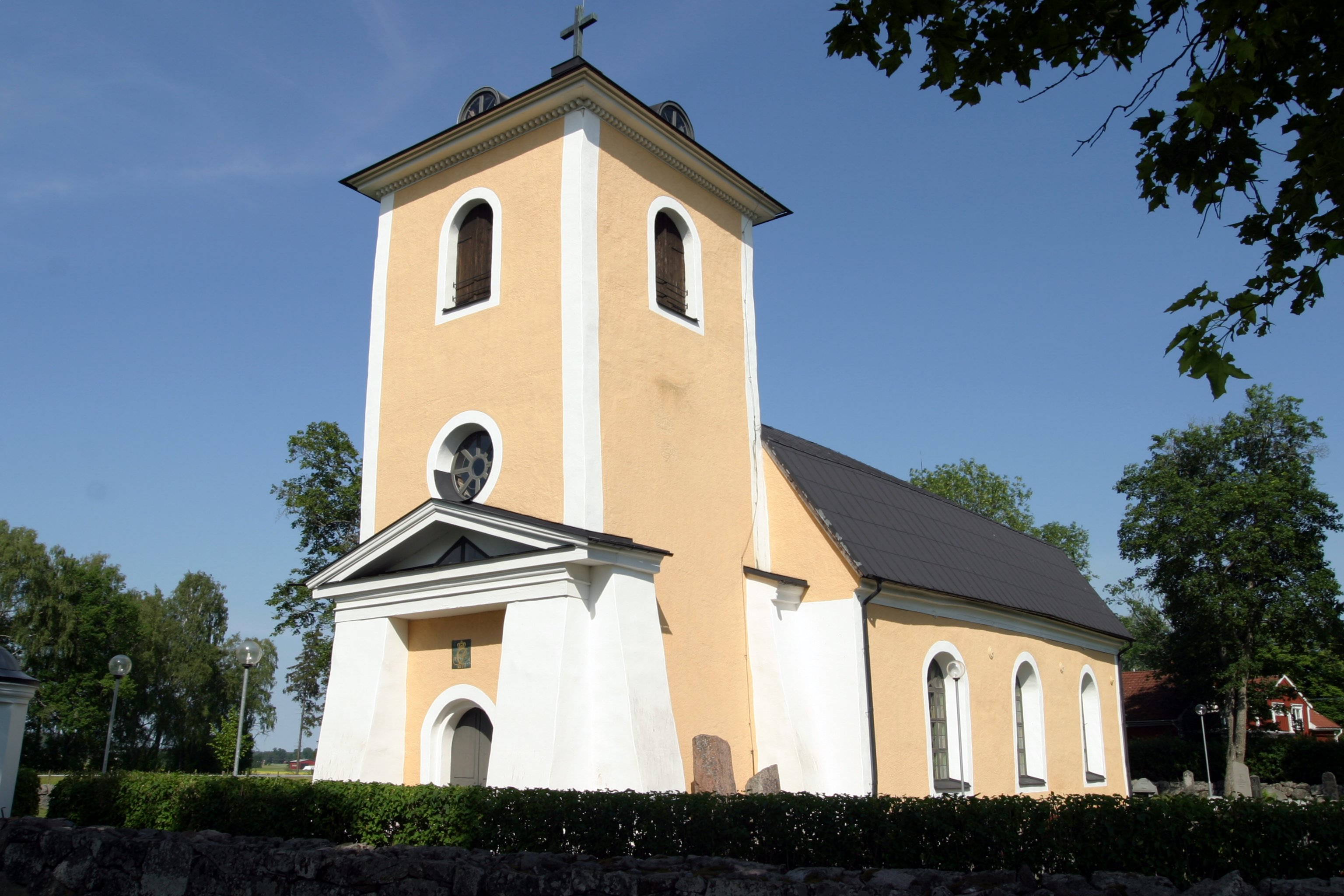 Åkerby kyrka